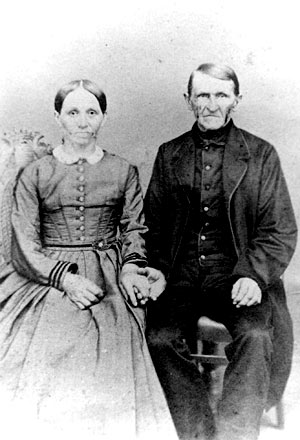 Orgelbauer Christian Friedrich Göthel mit seiner Ehefrau Christiane Sophie (Altersbild)